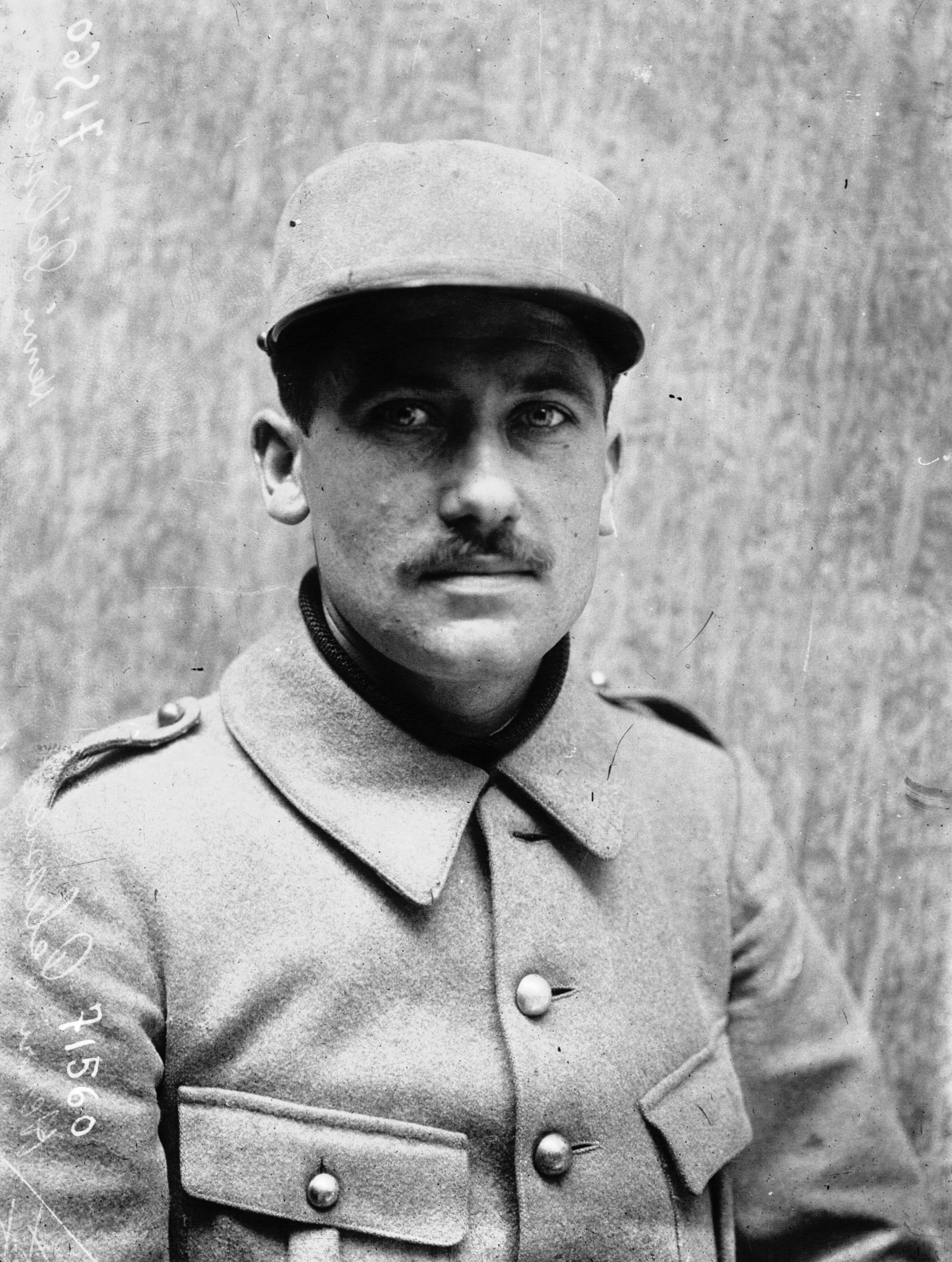 Paris-Roubaix cycliste : Henri Pelissier